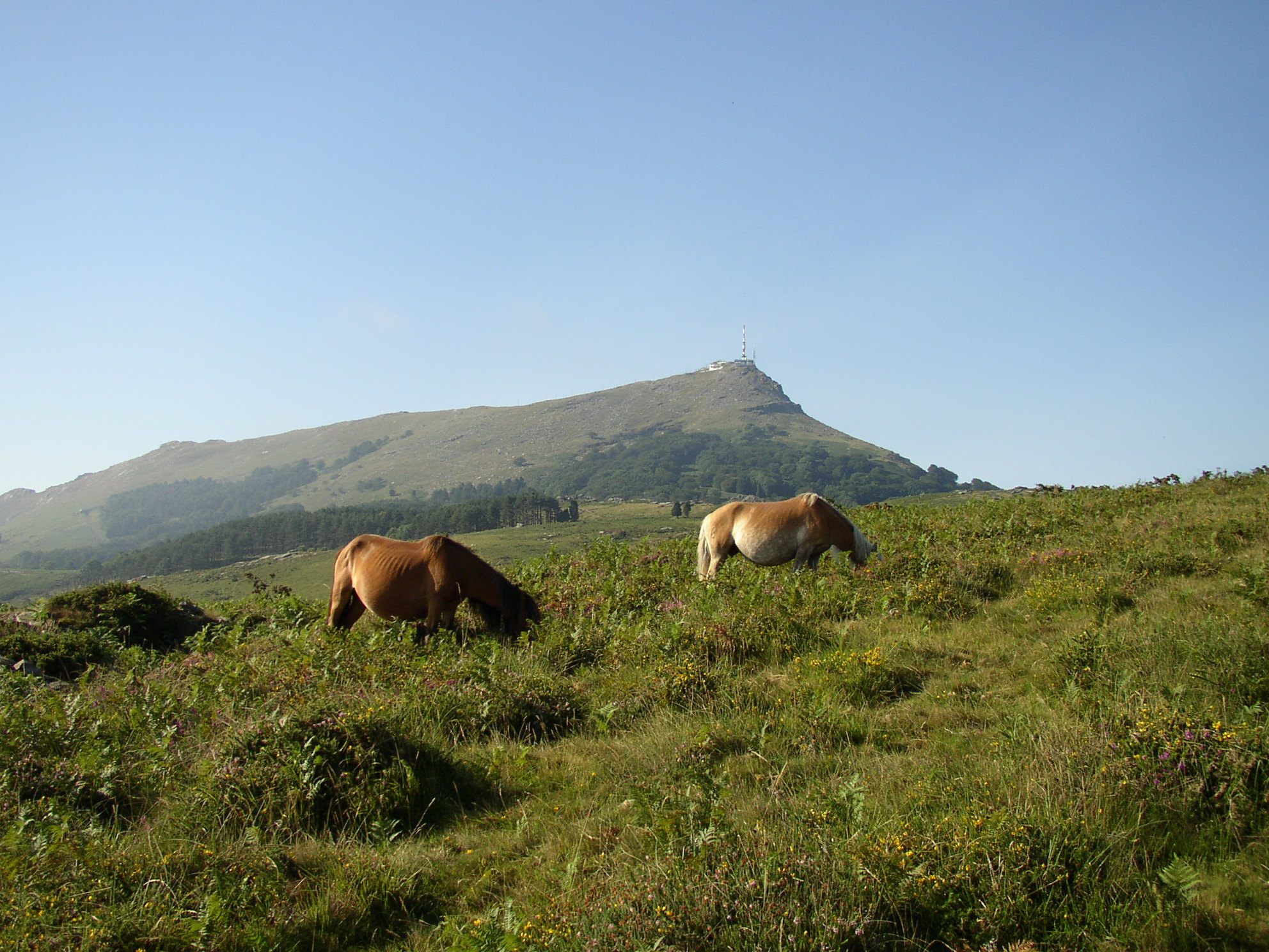 Vue du versant Nord de La Rhune (Pays Basque) Auteur : Utilisateur:olav2 2002 Olav2